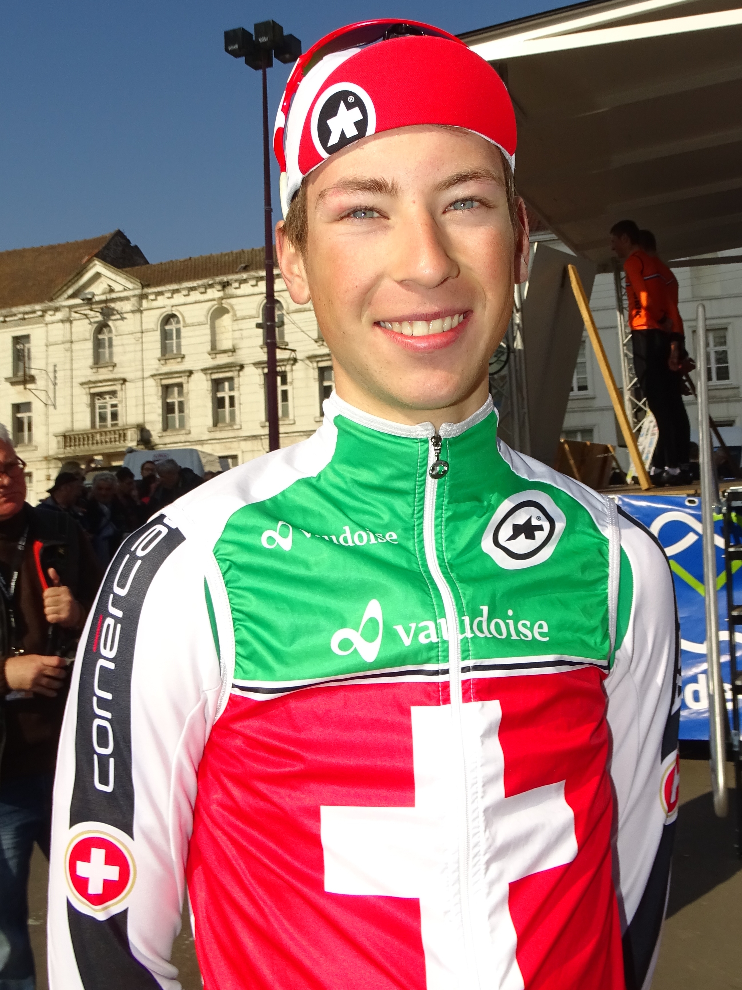 Reportage réalisé le dimanche 9 avril à l'occasion du départ du Paris-Roubaix juniors 2017 à Saint-Amand-les-Eaux, France.